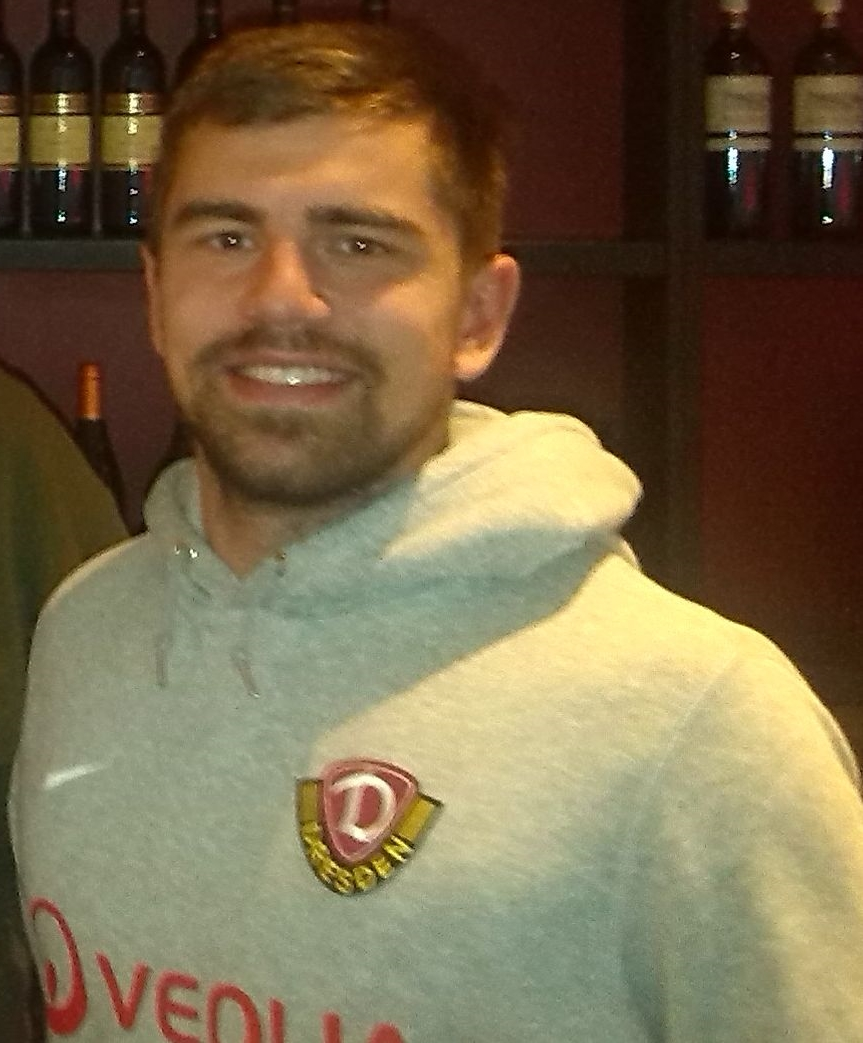 Benjamin Kirsten